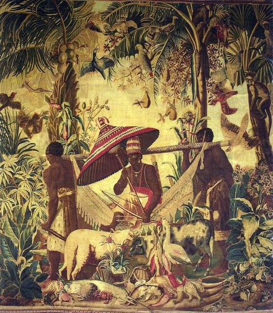 Manufatura de Gobelins. Le roi porté, tapeçaria, 376 x 358 cm. Acervo do Instituto Ricardo Brennand, Recife, Brasil.